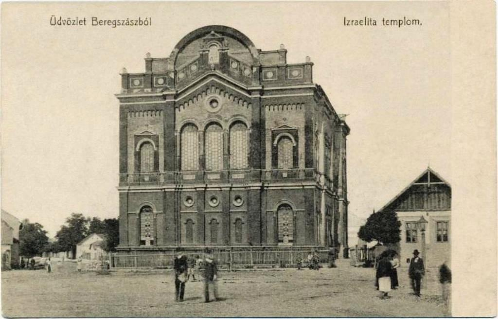 Берегово, такой была Большая синагога